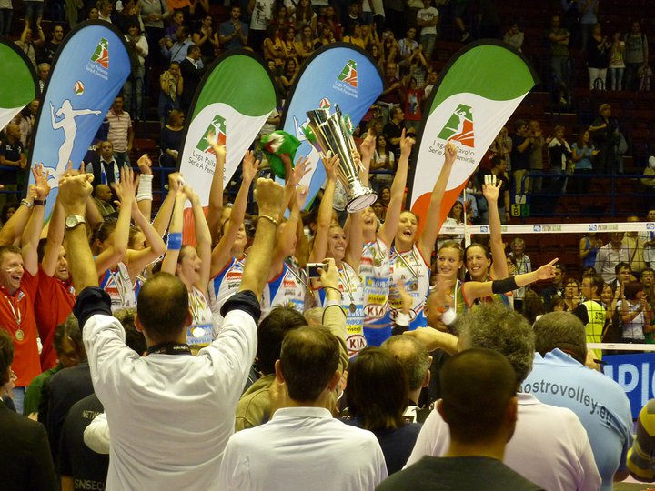 Il Volley Bergamo festeggia la vittoria dello scudetto 2010-11